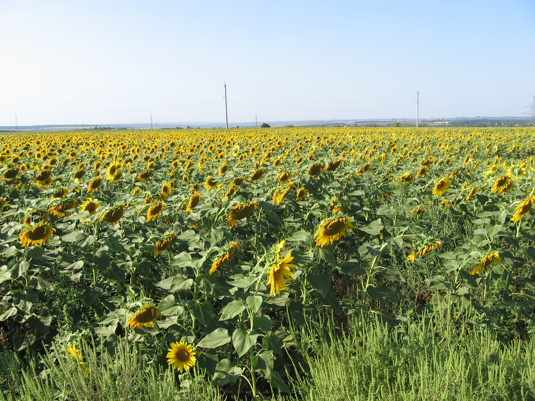 Фото